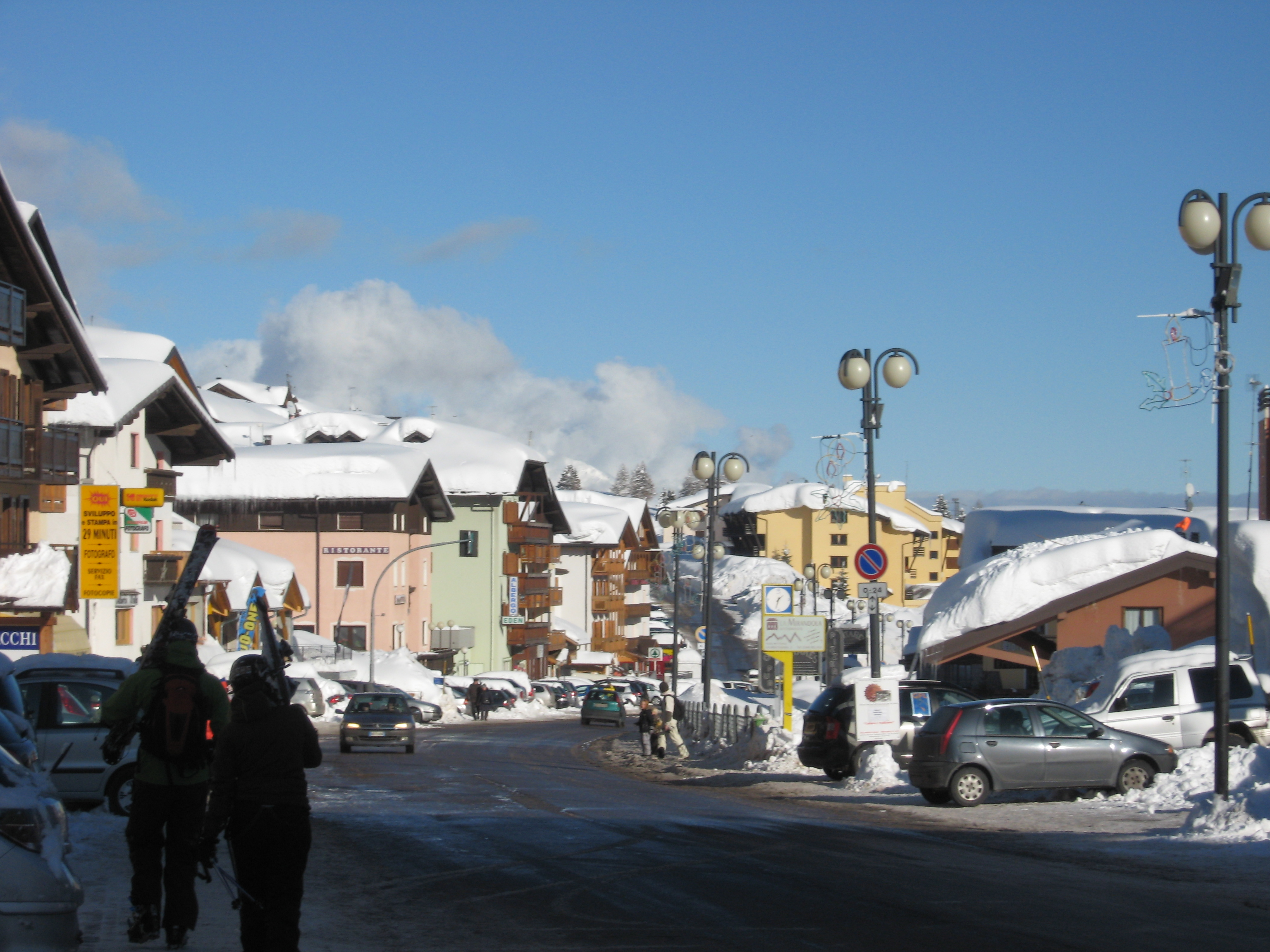 עיירת הסקי פאסו טונלה